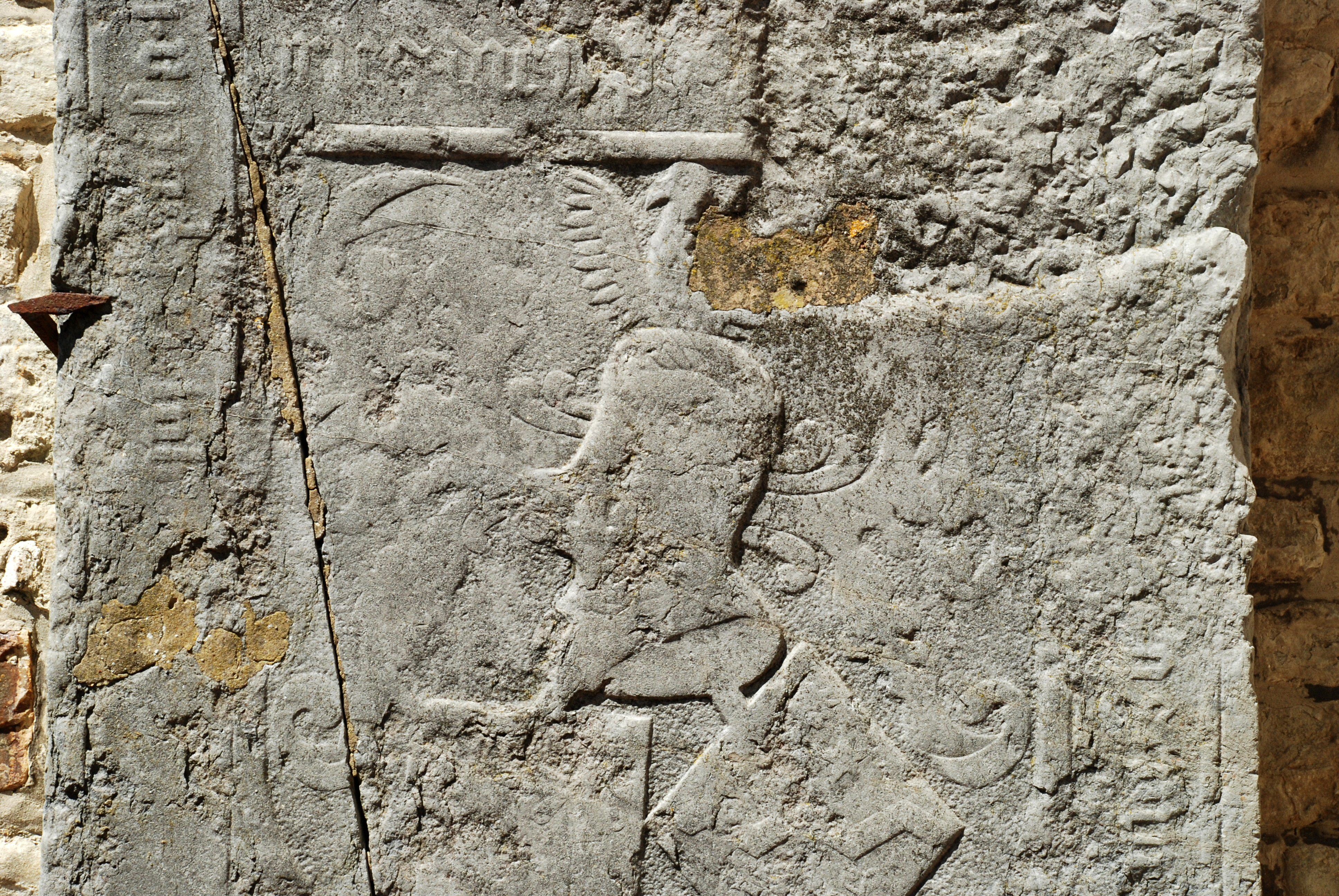 Belgique - Brabant wallon - Mont-Saint-Guibert - Église Saint-Pierre de Corbais - Dalle funéraire d'un seigneur inconnu